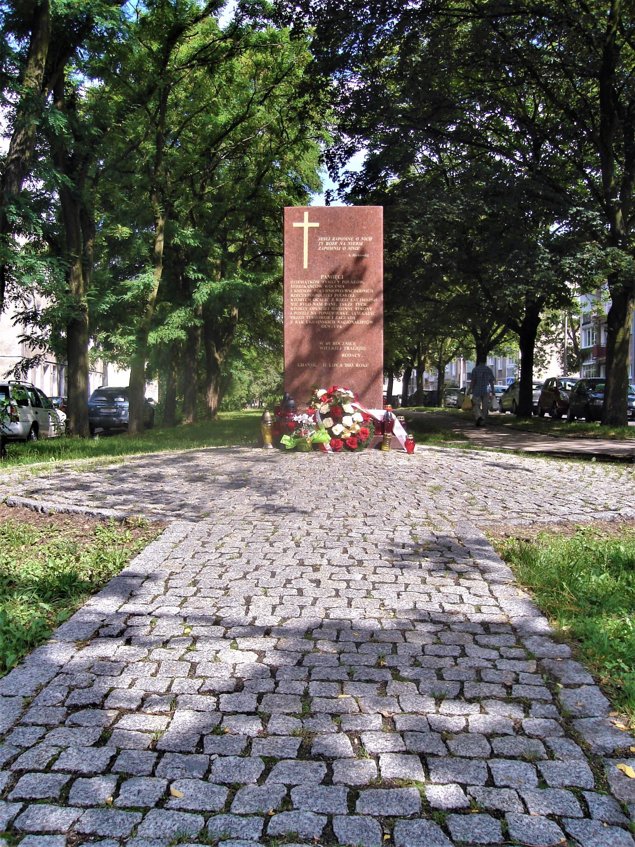 Pomnik, lokalizacja: Gdańsk-Stare Miasto, skwer przy ul. Stolarskiej i ul. Katarzynki. "Pamięci dziesiątków tysięcy Polaków, mieszkańców Wołynia i Kresów Południowo – Wschodnich Rzeczypospolitej Polskiej, których ocalić z rzezi lat 1943 – 1945 nie było nam dane, także tych, którzy opuścili rodzinne strony i poszli na poniewierkę, uciekając przed terrorem i zagładą z rąk ukraińskich nacjonalistów OUN – UPA” / W 60 rocznicę wielkiej tragedii / Rodacy/ Gdańsk, 11 lipca 2003 roku"